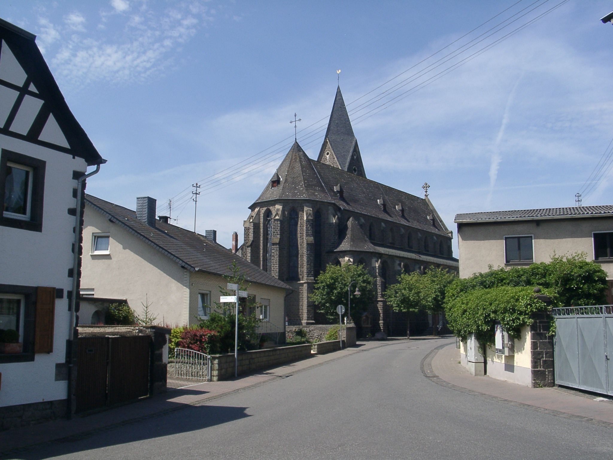 Kirche von Thür - selbst fotografiert (Klaus Graf) 28.7.2005